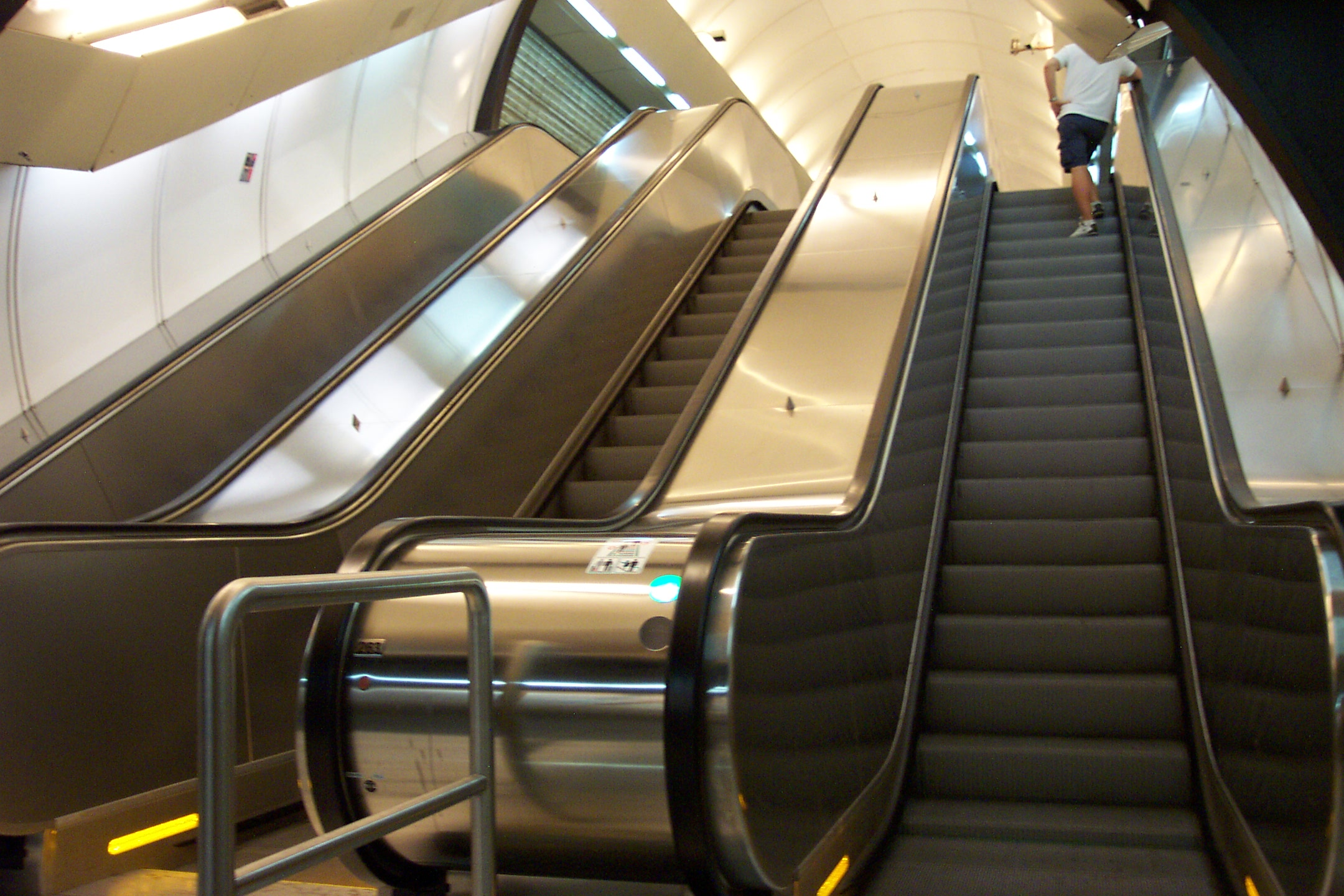 Stanice metra Karlovo náměstí - Metro station Karlovo náměstí